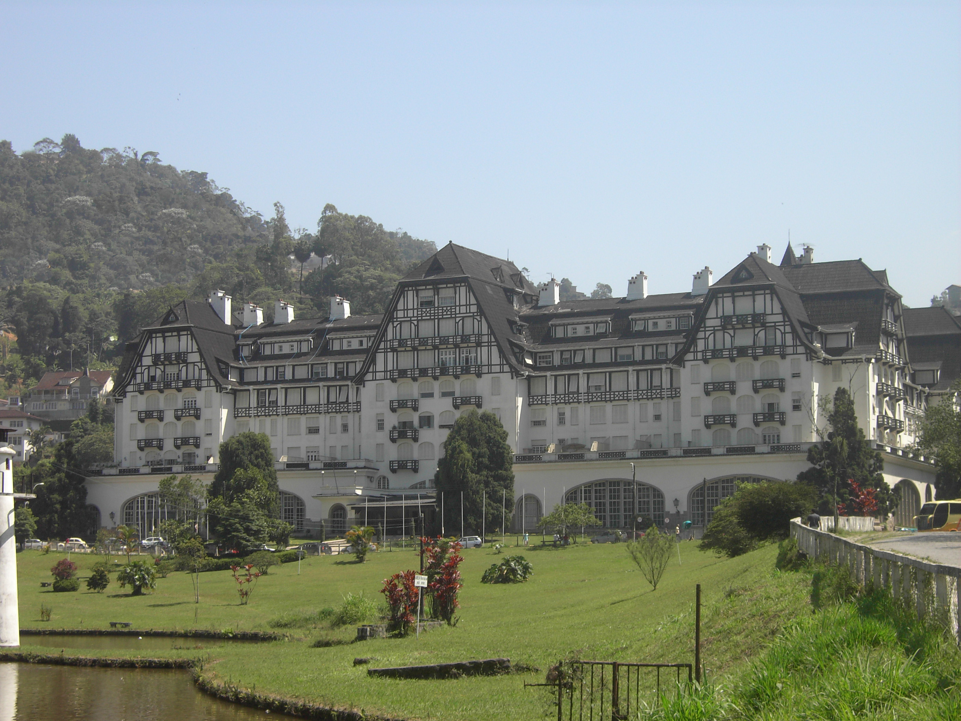 Quitandinha, Petropolis-RJ